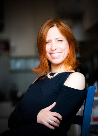 Christiane Schinkel (* 1965), Piratenpartei Deutschland, Landesverband Berlin